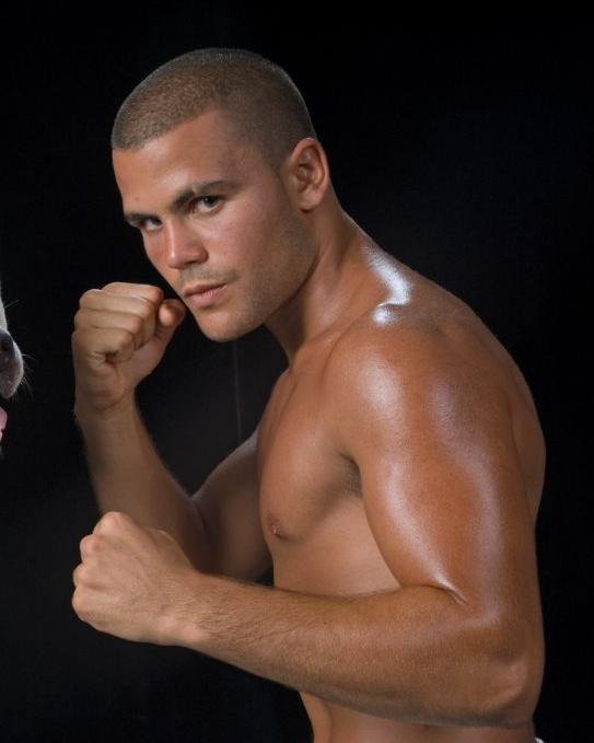 המתאגרף אלעד שמואל